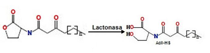 Reacció AHL catalitzada per lactonasa